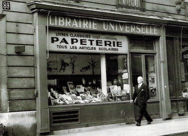 Librairie-Papeterie à la rue de la Pompe, 16ème.